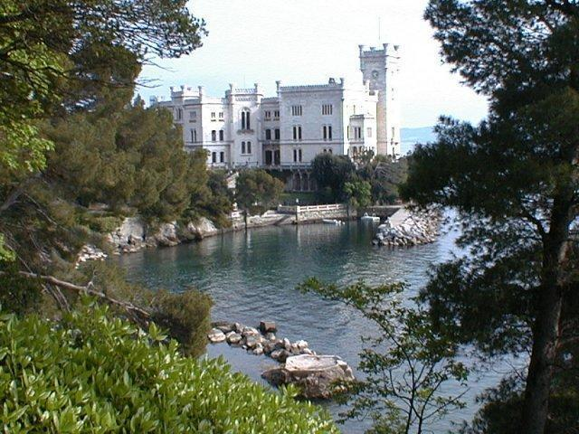 Castello di Miramare a Trieste.